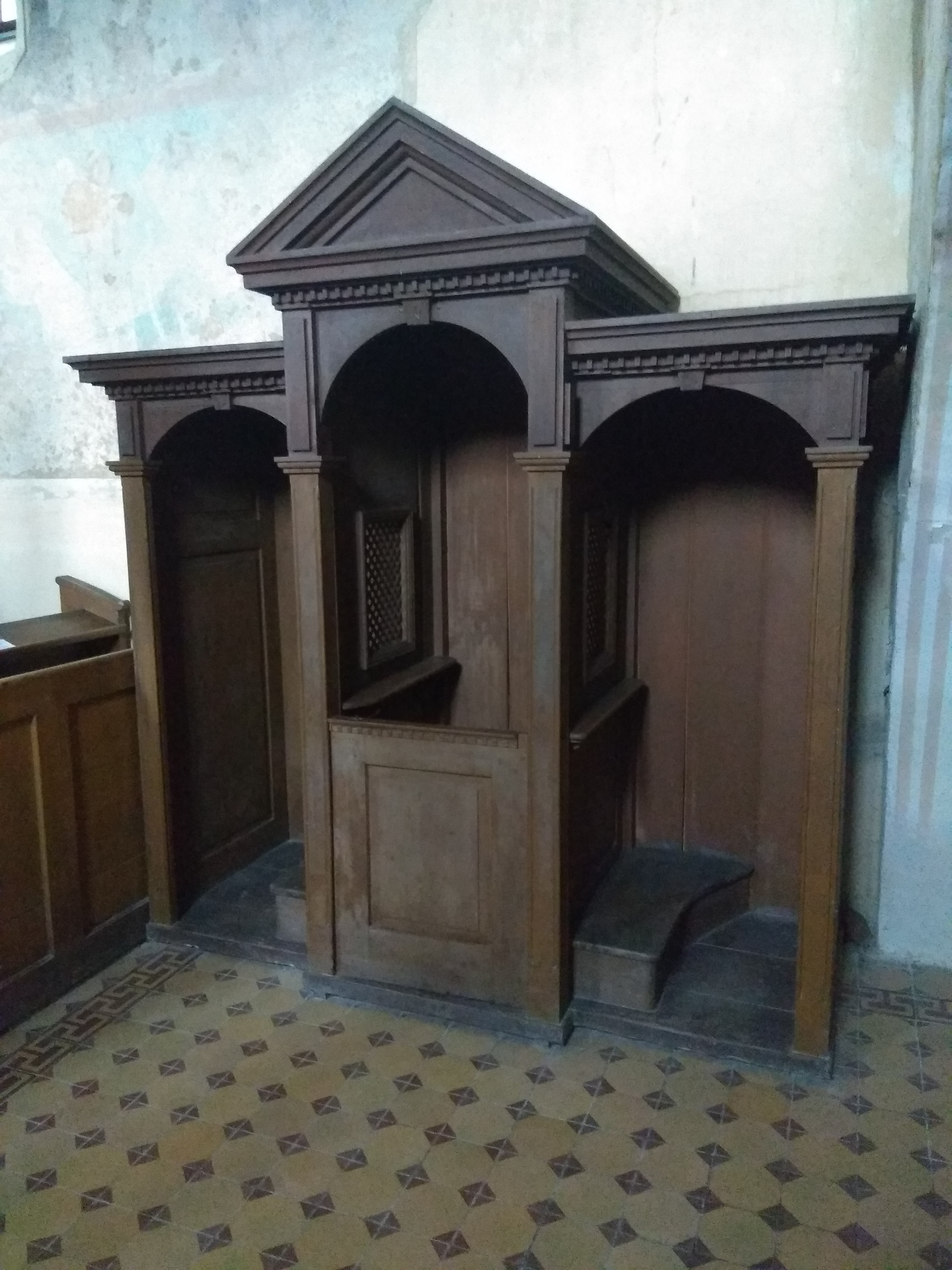 Olešky kostel - zpovědnice